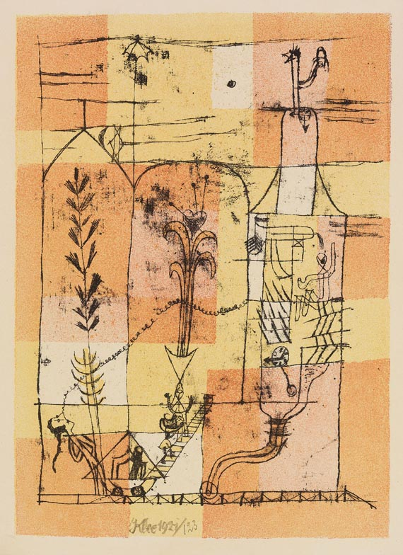 Hoffmanneske Szene. 1921. Farblithografie, Signiert, datiert und mit der Werknummer "123". 31,8 x 22,7 cm (Platte)